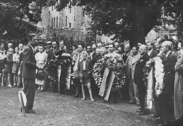 Berlin, 20. Todestag Heinrich Zille, Rede Nagel 20. Todestag von Heinrich Zille. Am 28.7.49 wurden vor dem Denkmal Heinrich Zilles anläßlich seines 20. Todestages von der Stadt Berlin und den demokratischen Organisationen Kränze niedergelegt. Der Maler Prof. Otto Nagel, ein alter Freund Zilles, hielt die Gedenkrede. UBz: Prof. Otto Nagel bei seiner Gedenkrede. Aufn. Illus Igel 3649-49 Leihweise Illus Berlin Ws Abgebildete Personen: Nagel, Otto Prof.: Maler, Präsident der Akademie der Künste (AdK), Nationalpreisträger, Vaterländischer Verdienstorden (VVO) in Gold, DDR (PND 118586300)